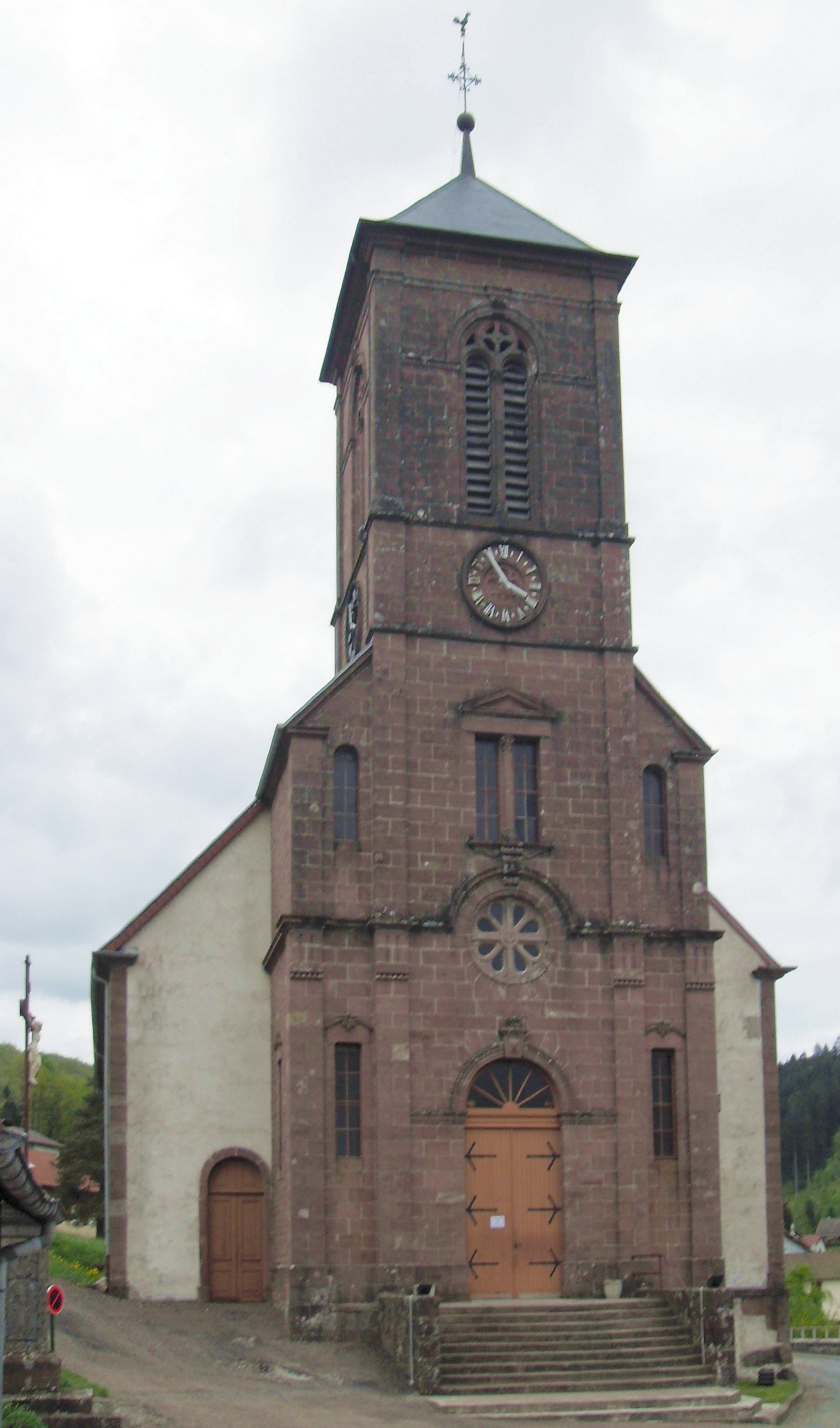 L'église de l'Assomption-de-la-Vierge à Haut-du-Them-Château-Lambert